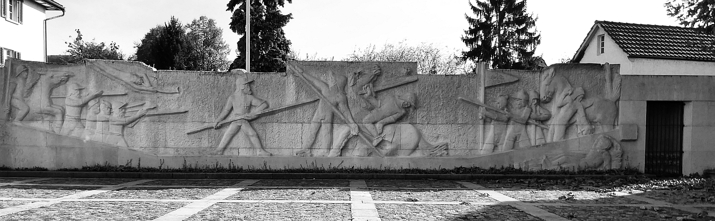 Schlacht-Denkmal bei Dornach vom 22. Juli 1499, von Jakob Probst (*17. August 1880 in Reigoldswil, Basel-Landschaft; † 28. März 1966 in Vira, Tessin) Bildhauer.